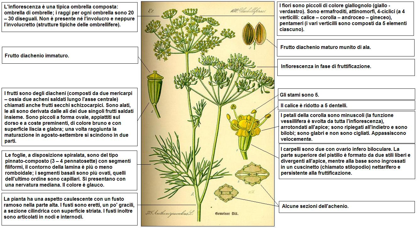 Anethum graveolens Thome DESC